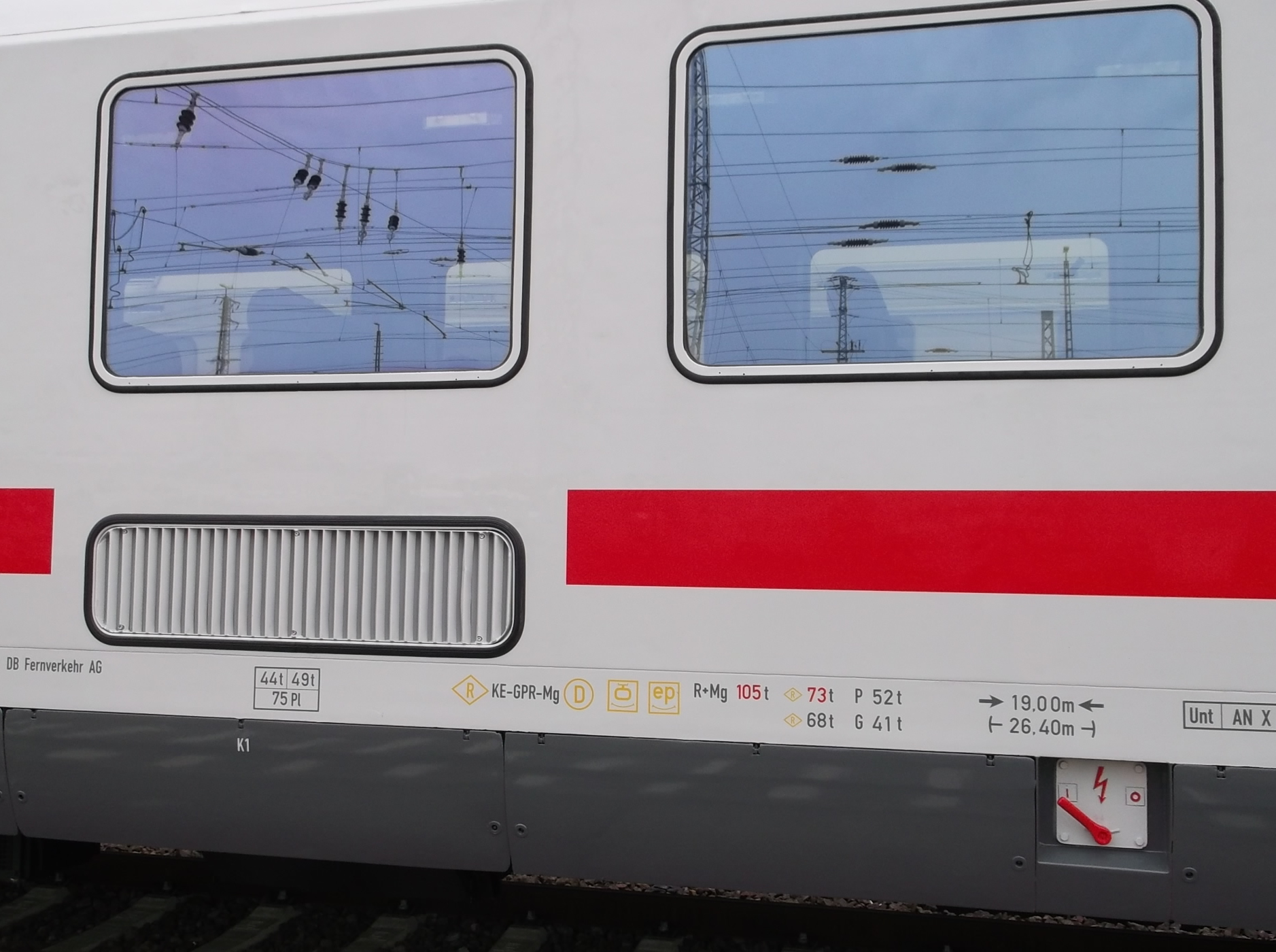 Bremsanschrift eines Inter City Reisezugwagen der Deutschen Bahn